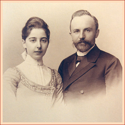 מרטה רחל פרויס לבית הלברשטאדט (המבורג 1960-1876 ישראל) עם בעלה, ד”ר יוליוס-יצחק פרויס, רופא מברלין (גרוס-שנבק 1913-1861 ברלין).